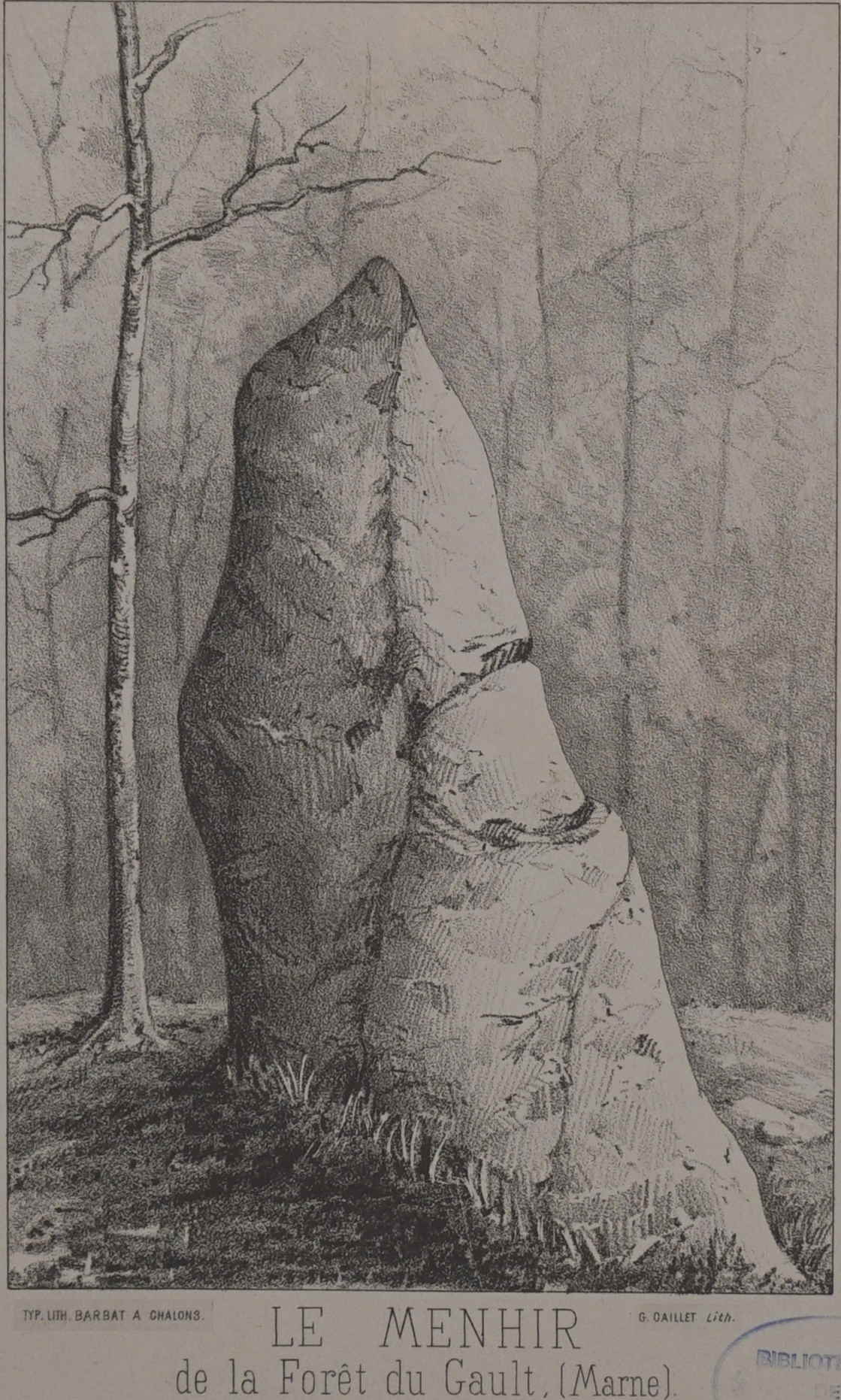 vue d'un dessin de fouilles conservé à la BMR sous la cote CLXI.